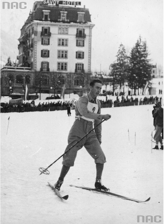 Lars Bergendahl pendant l'épreuve de ski de fond à Chamonix en 1937